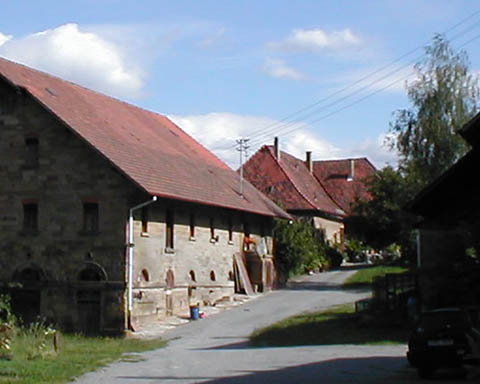 Blick in den Innenhof des Neippergschen Schlosses in Heilbronn-Klingenberg